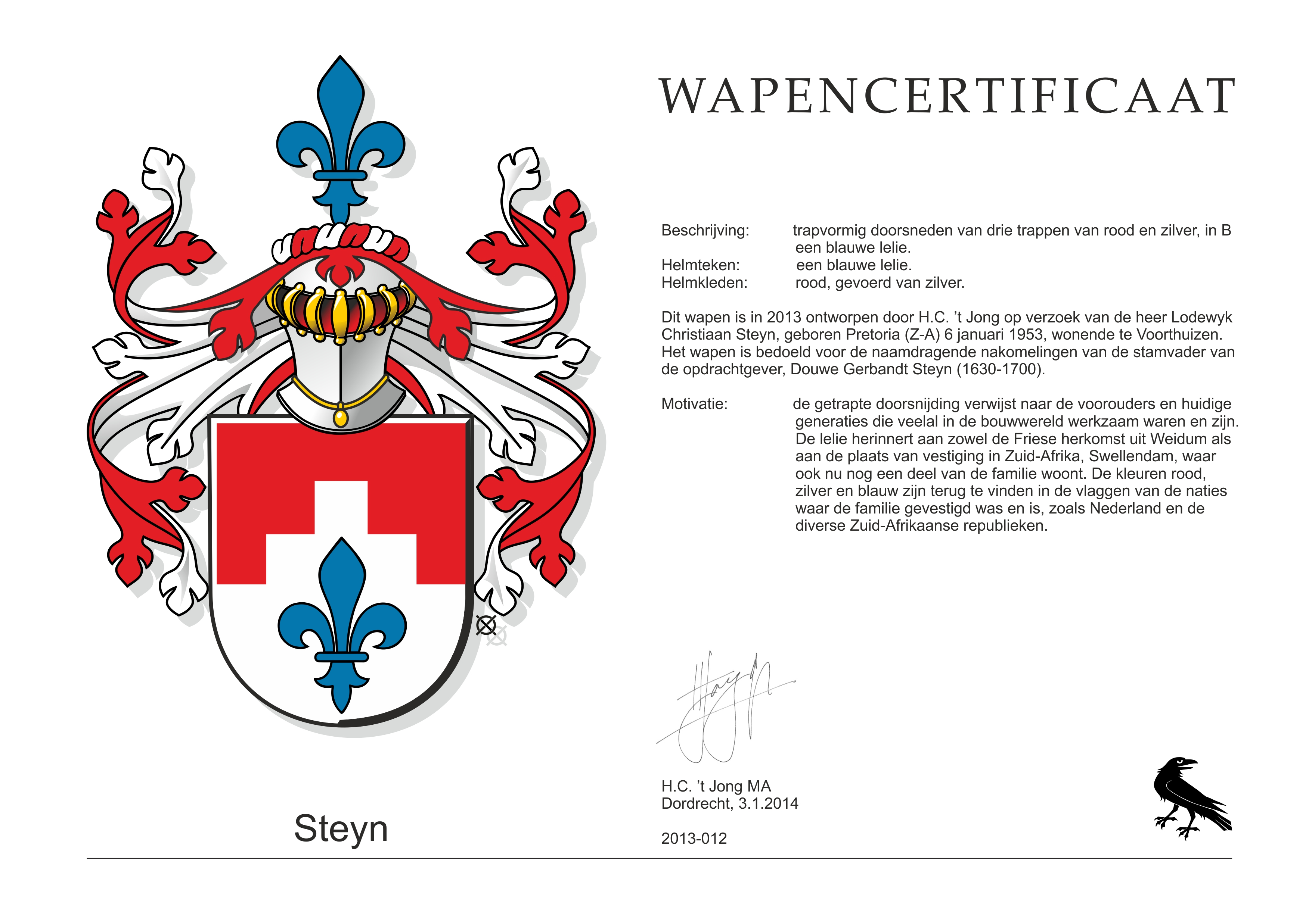 Offisieël geregistreerde familiewapen vir die nasate van Douwe Gerbrandt Steyn